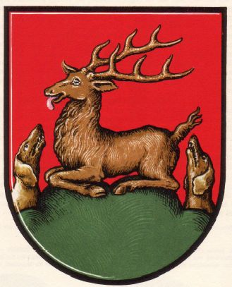 Grb trga Pilštanj (Kobel in Pirchegger, 1954; Widimsky, 1864)